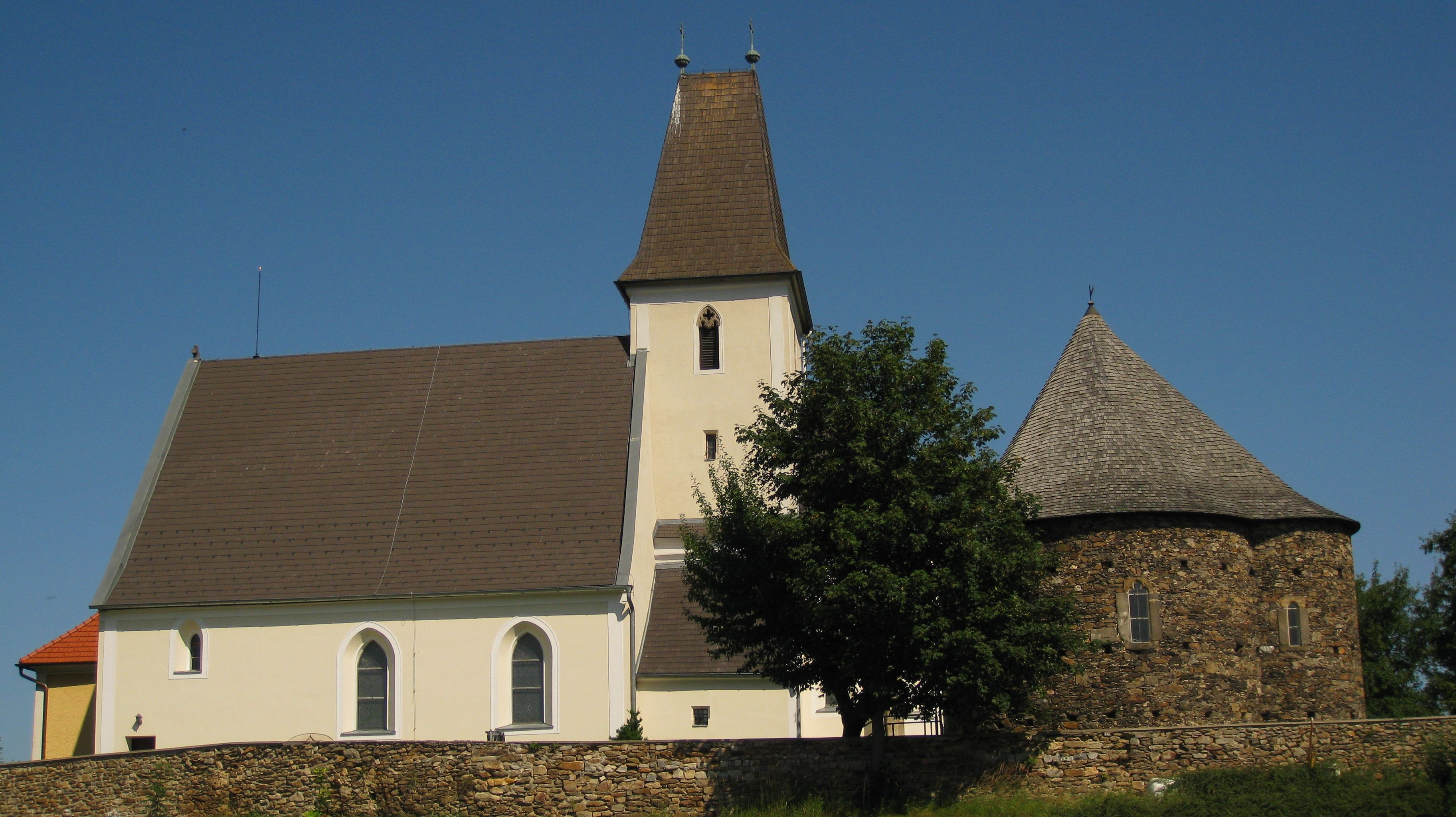 Kath. Pfarrkirche hl. Leonhard